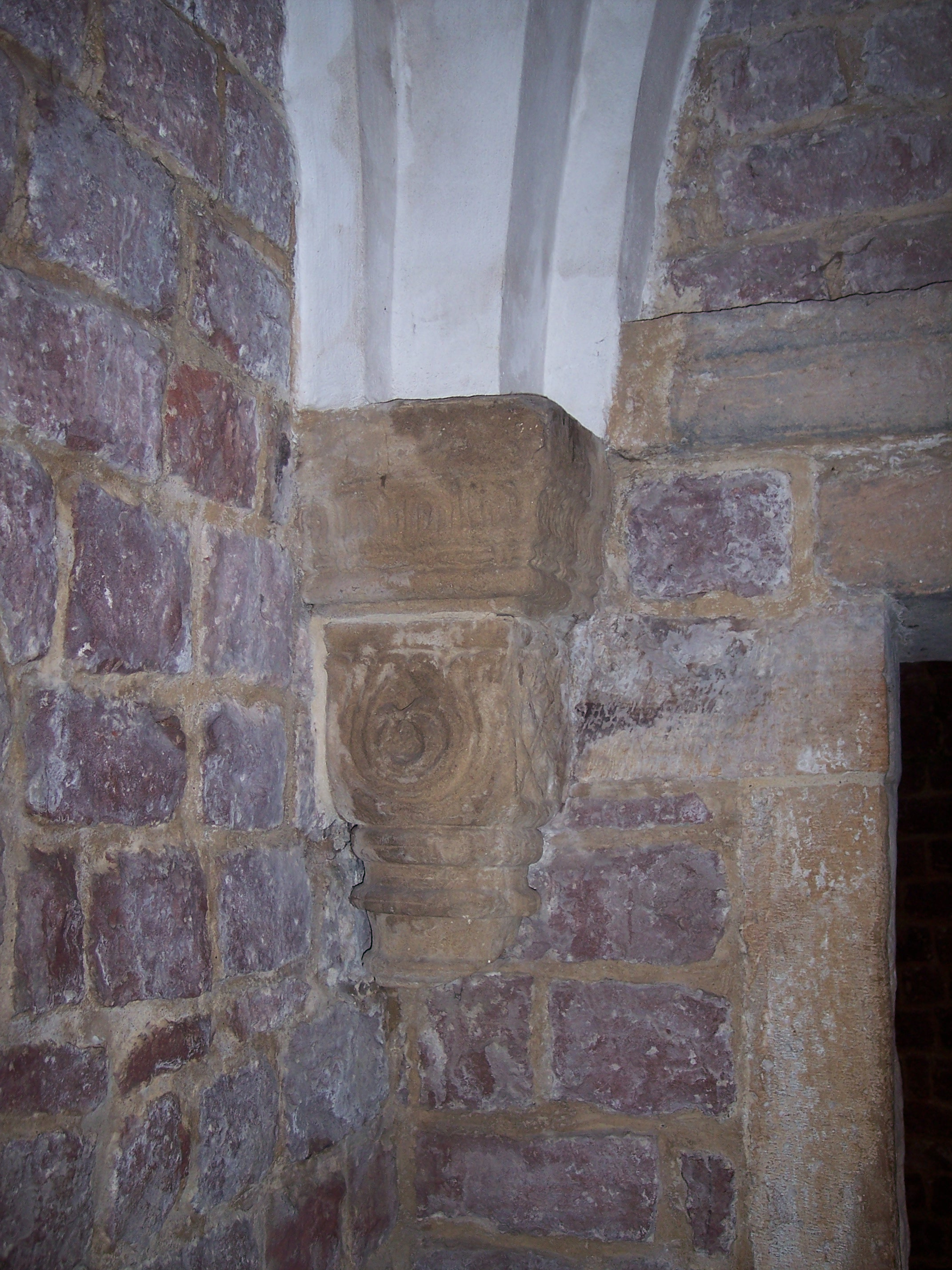 made by myself